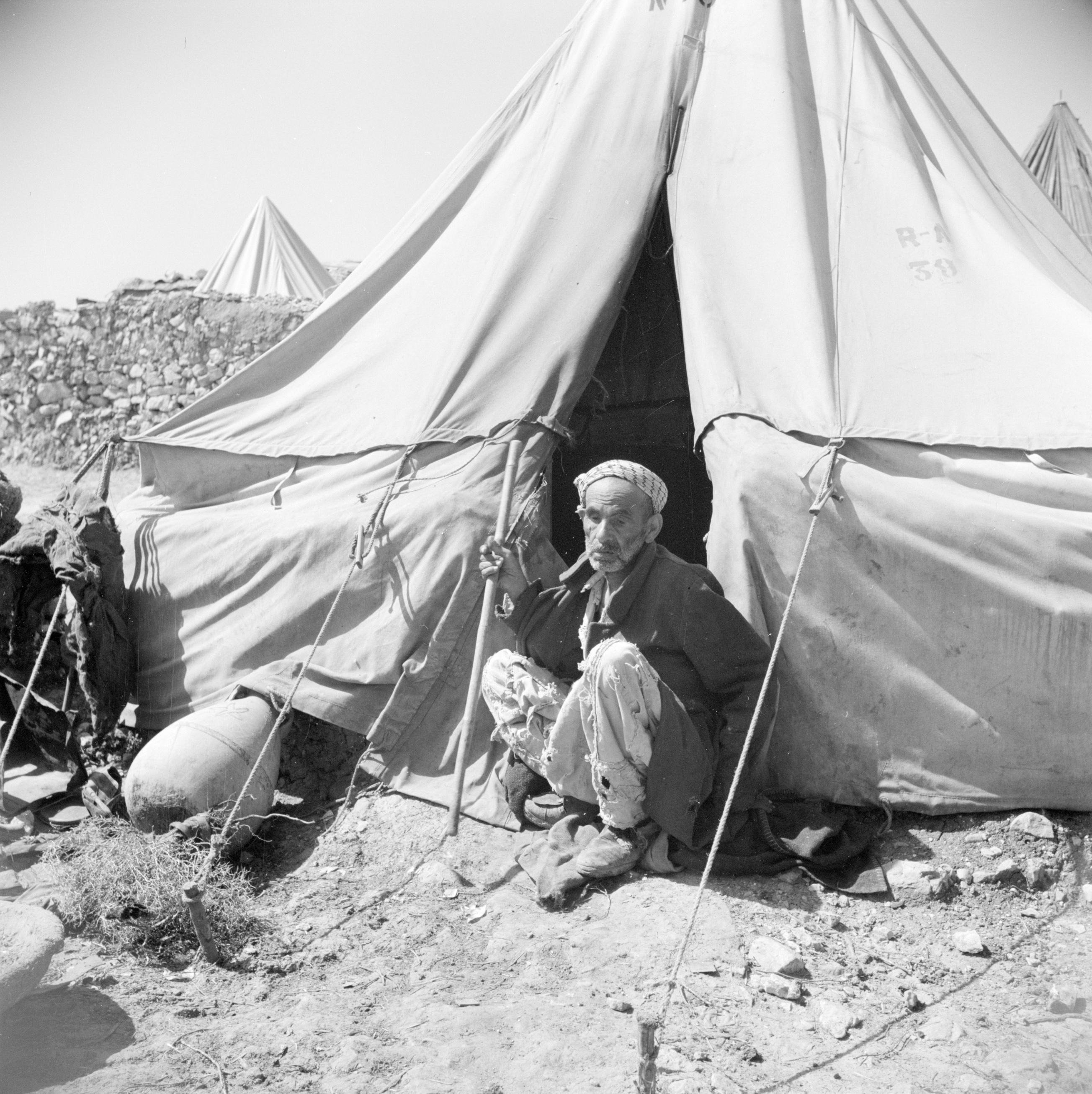 Collectie / Archief : Fotocollectie Van de Poll Reportage / Serie : Midden-Oosten 1950-1955: Jordanië Beschrijving : Oude man voor zijn tent in het vluchtelingen kamp Amari nabij Ramallah Annotatie : Ten tijde van de opname lag deze plaats in Jordanië Datum : 1950 Locatie : Palestine, Jordanië, Ramallah Trefwoorden : kampen, tenten, vluchtelingen Fotograaf : Poll, Willem van de Auteursrechthebbende : Nationaal Archief Materiaalsoort : Negatief (zwart/wit) Nummer archiefinventaris : bekijk toegang 2.24.14.02 Bestanddeelnummer : 255-5747